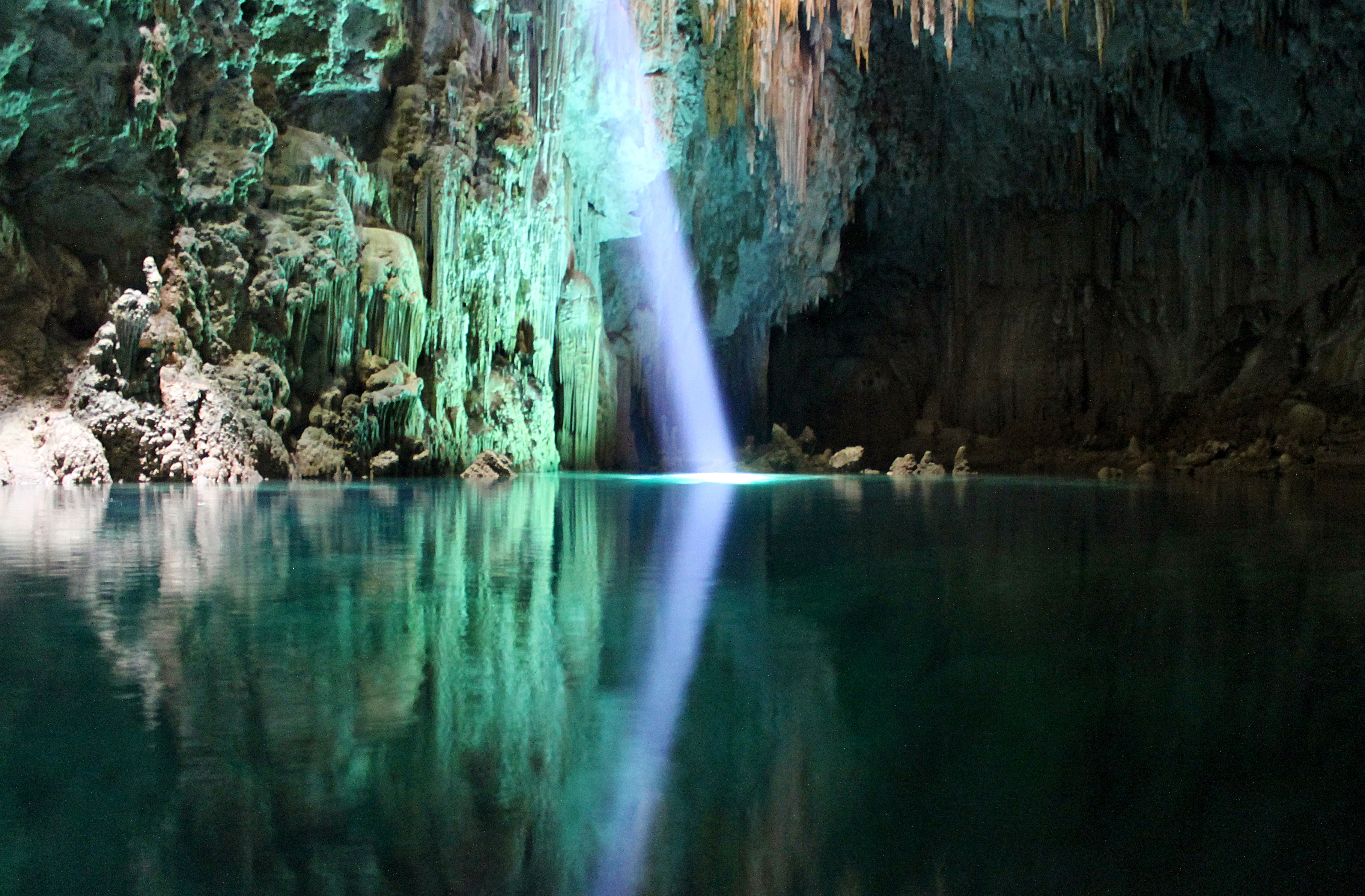 foto do lago do abismo anhumas - bonito-ms